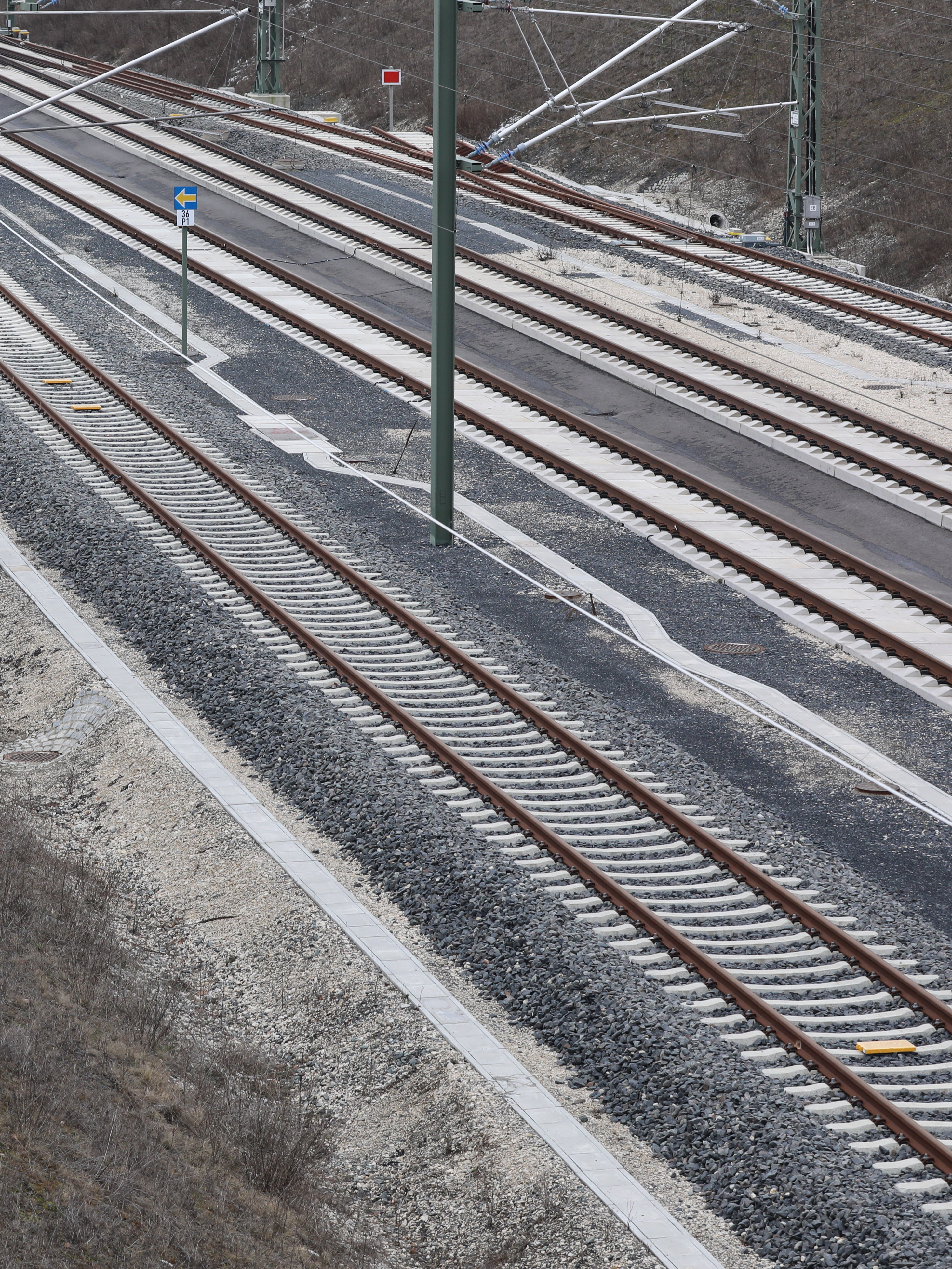 Überholbahnhof Rödental